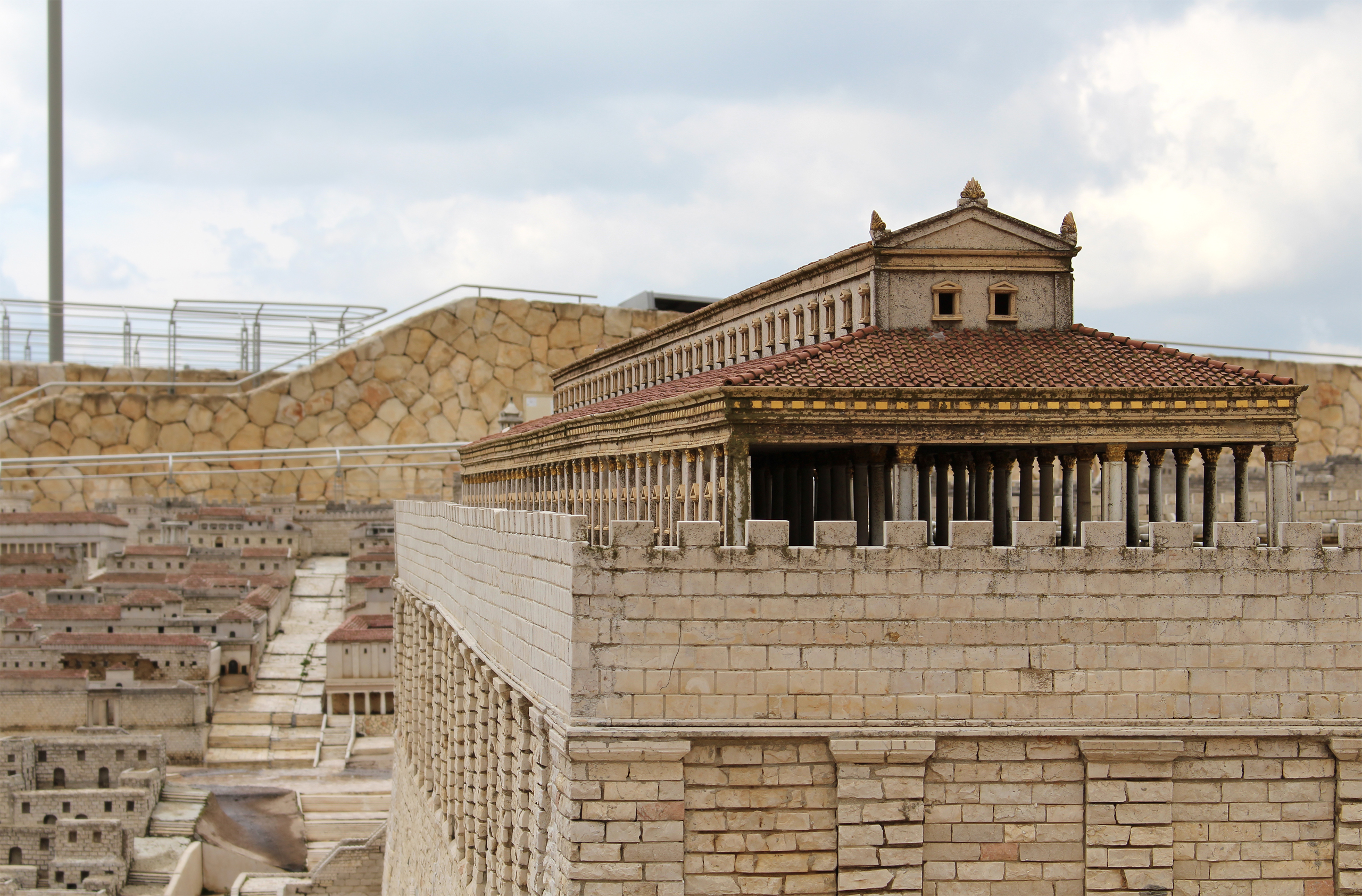 הסטיו המלכותי, הצעת שחזור מתוך דגם ירושלים בימי הבית השני, מוזיאון ישראל בירושלים